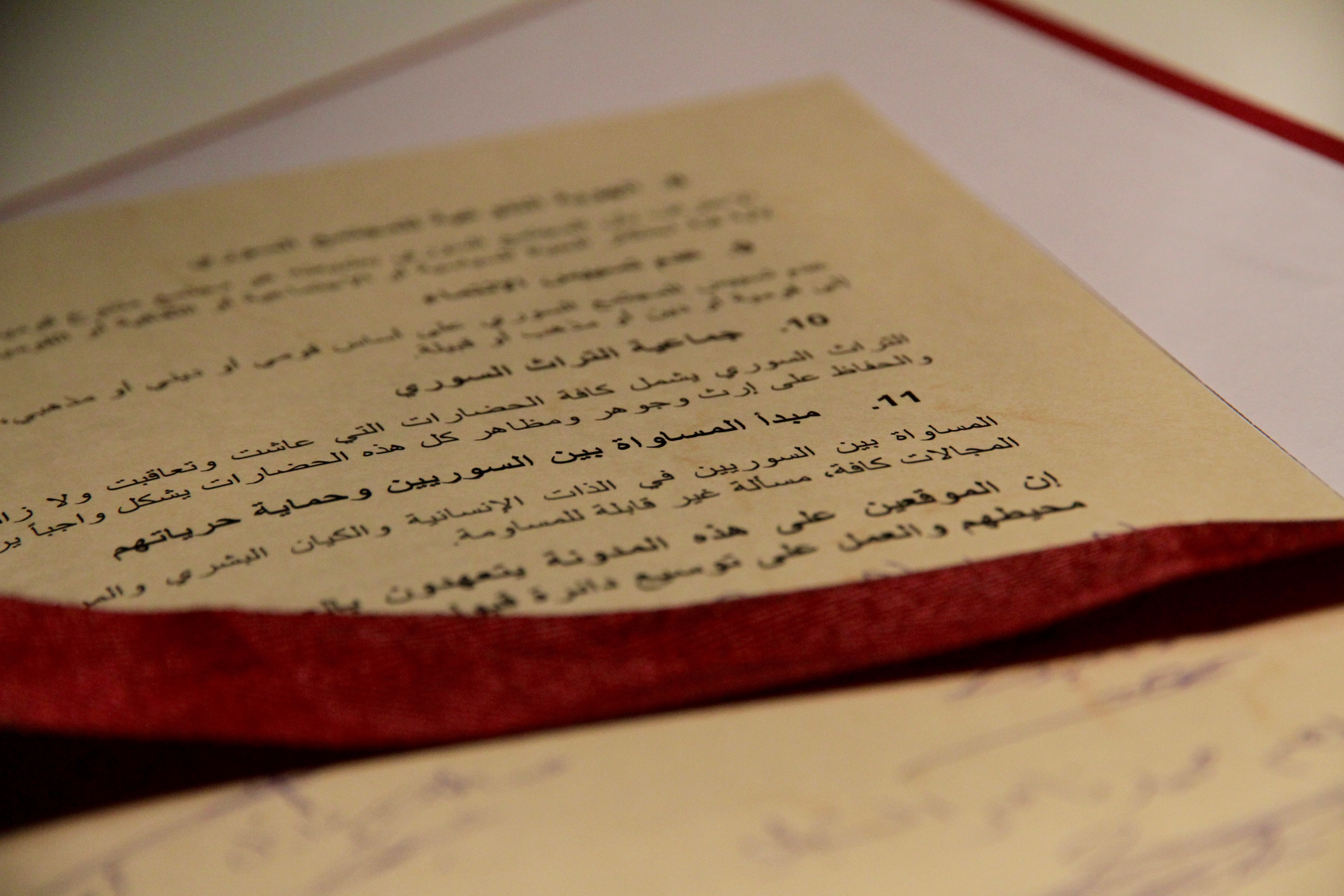 Dokument der syrischen Charta (Verhaltenskodex für ein syrisches Zusammenleben), 2017